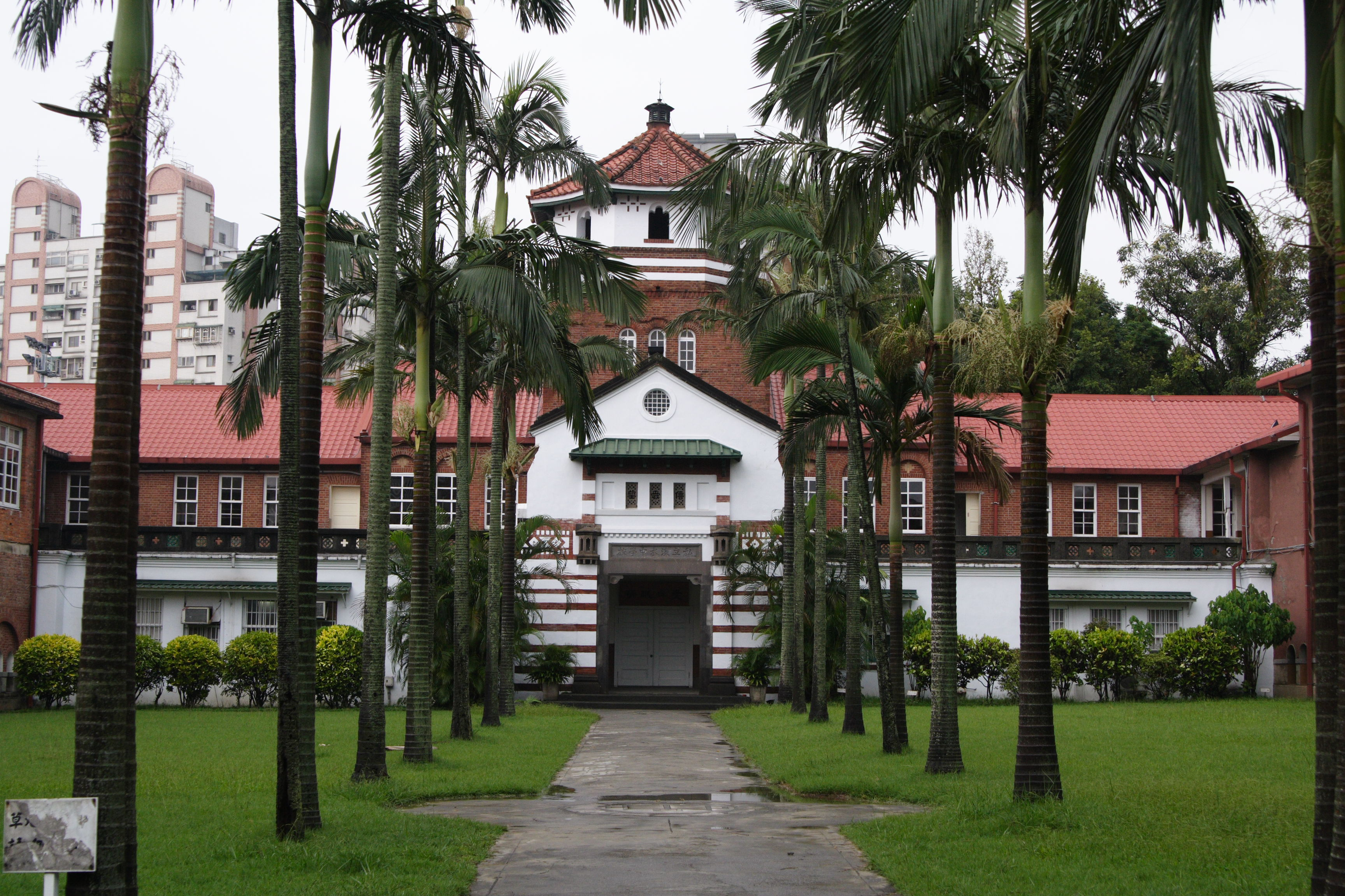 臺灣臺北縣淡水鎮淡江高級中學八角塔。